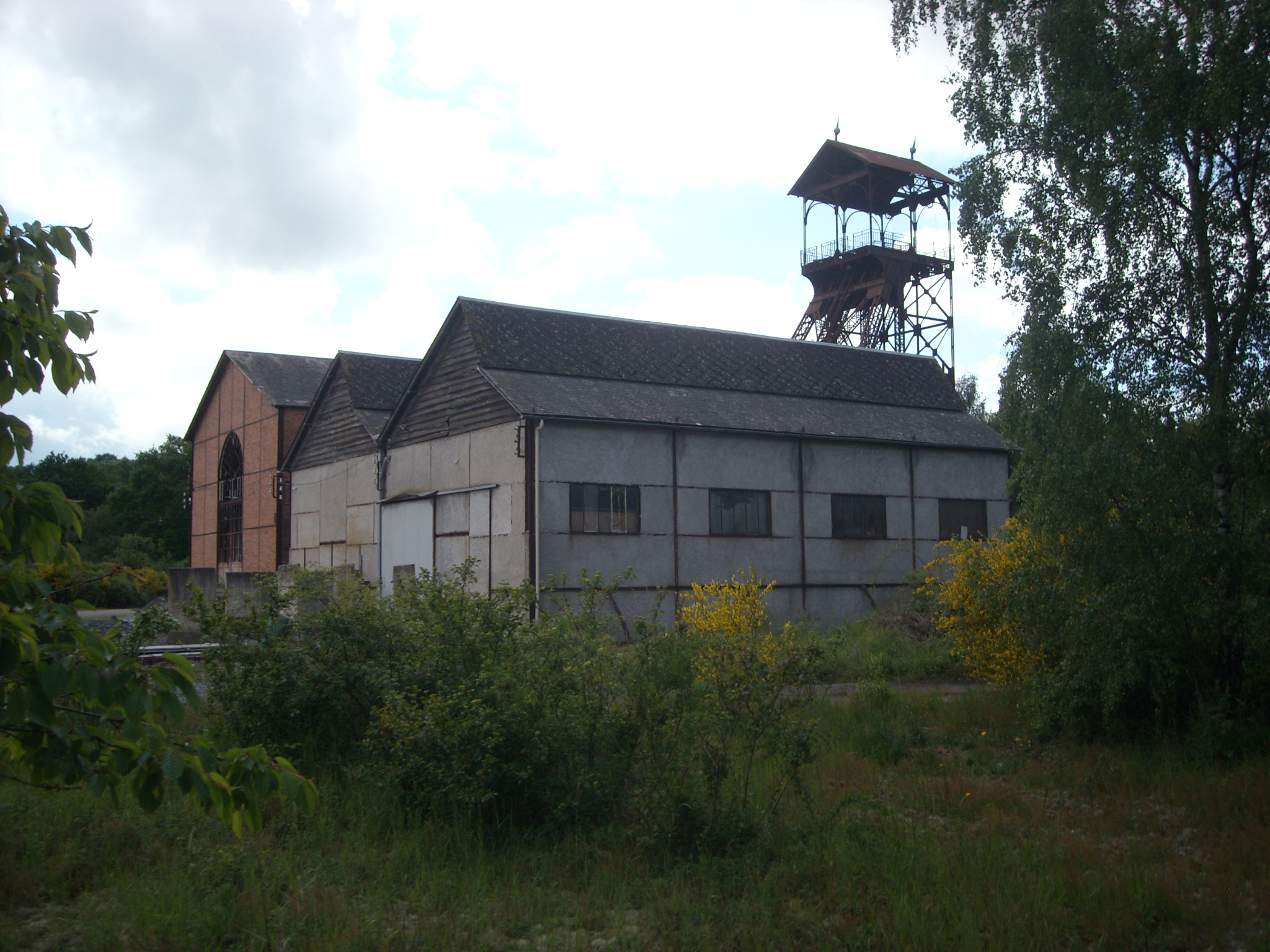 Bâtiments de la mine.